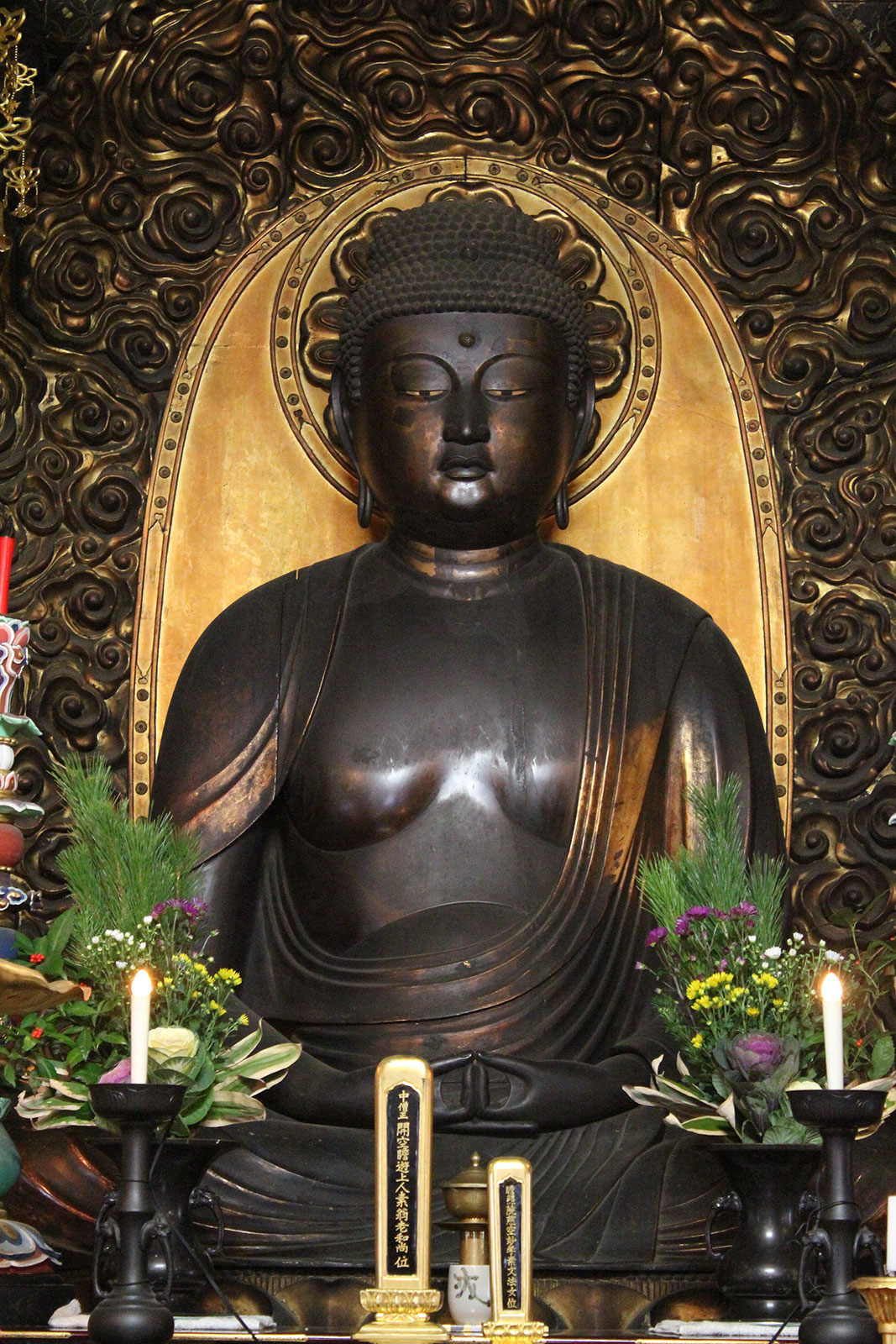 栄国寺本尊 阿弥陀如来坐像